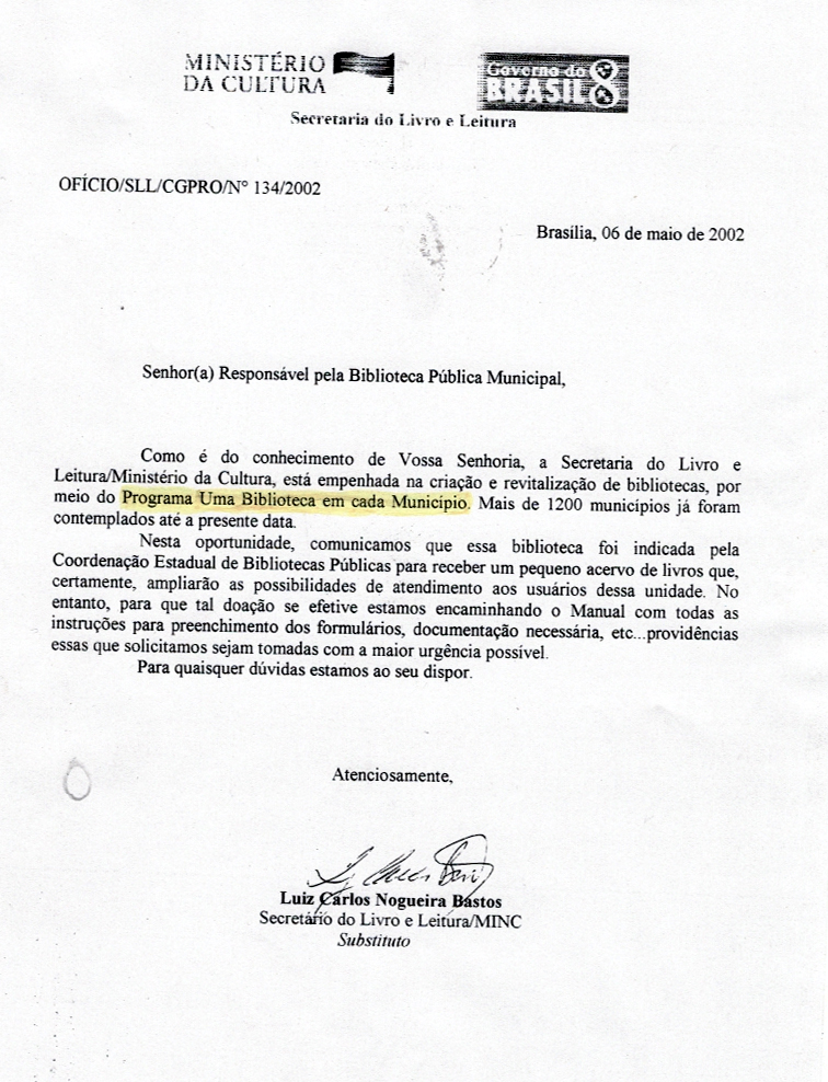 Um ofício do Programa Uma Biblioteca em cada Município. Foi um programa do Ministério da Cultura no governo Fernando Henrique Cardoso. Nota-se que, no timbre, tem a logmarca dos 8 anos do governo de Fernanado Henrique Cardoso